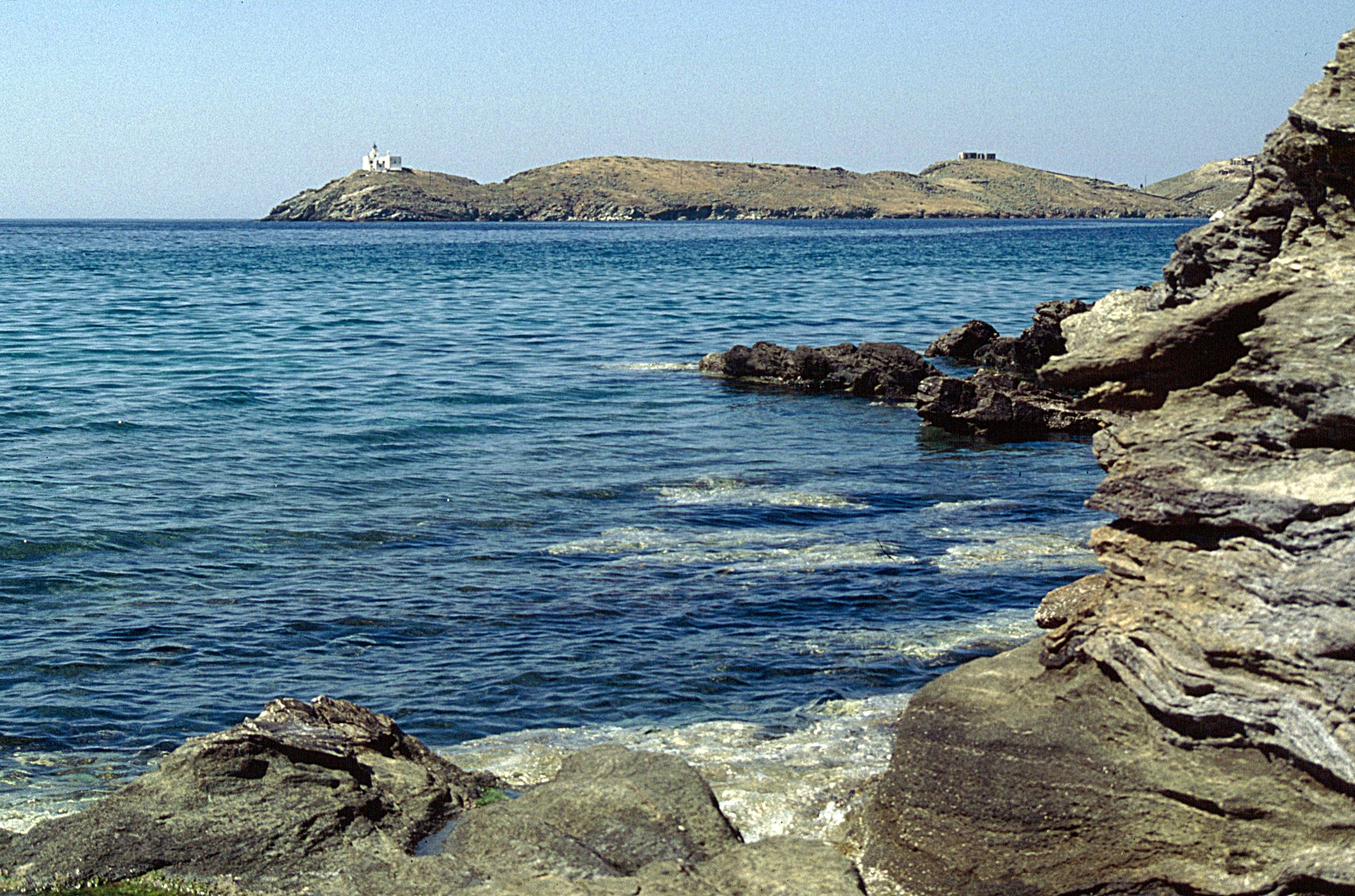 bei Korissia (Kea)